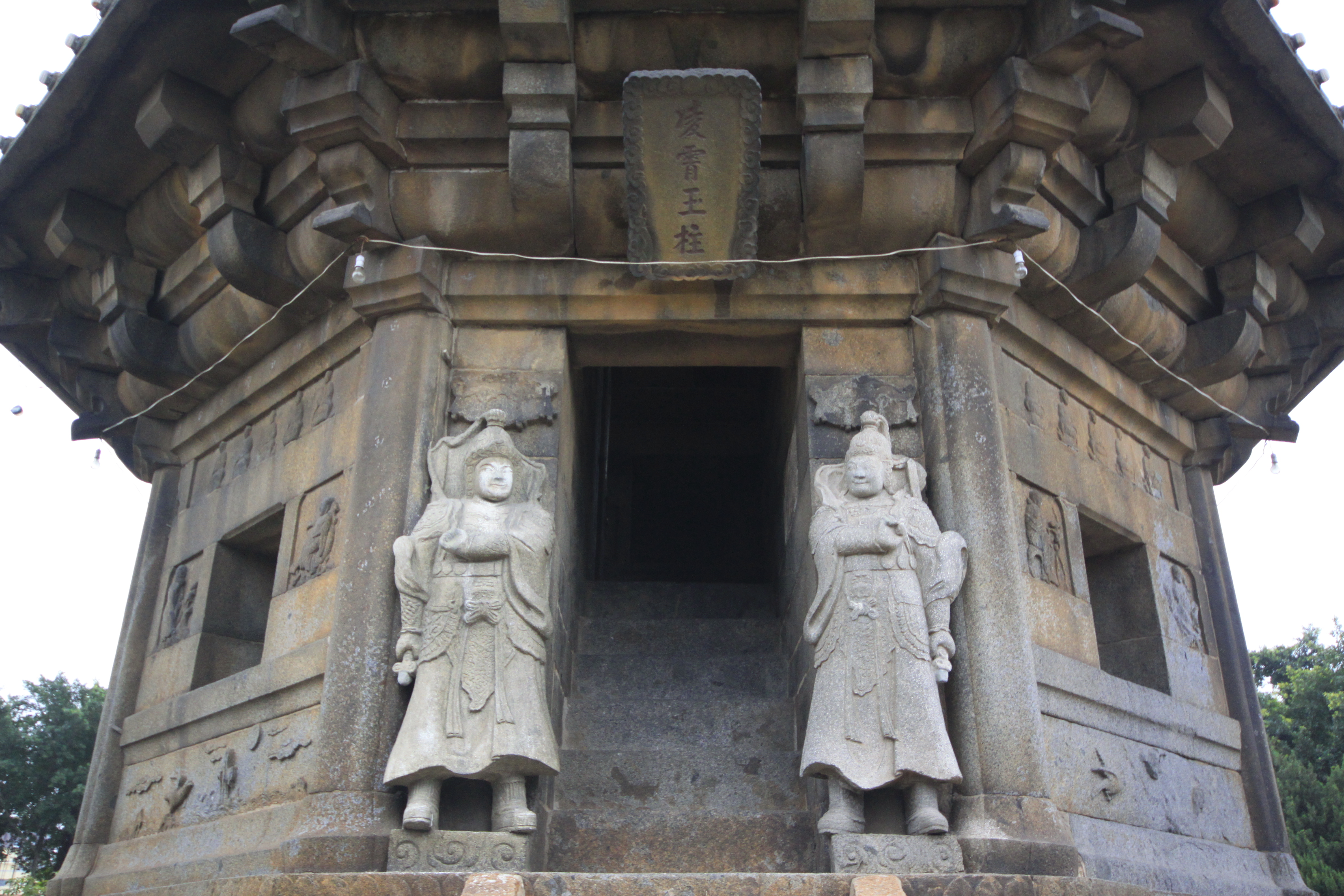 瑞云塔，位于中国福建省福清市。